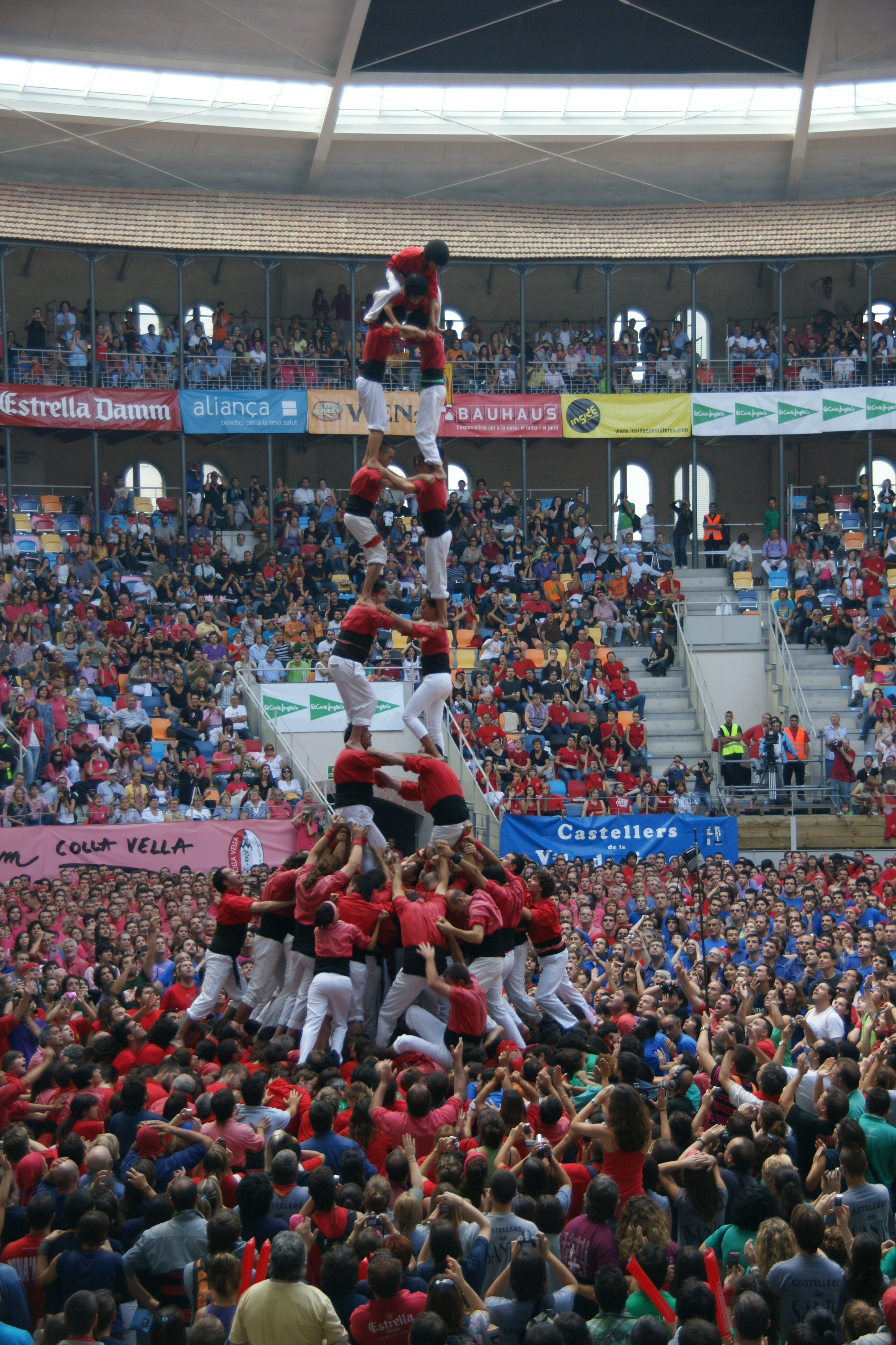 Xicots de Vilafranca, 2 de 8 amb folre, carregat. Concurs 2010